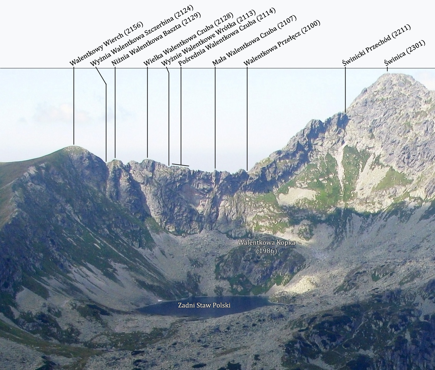 Walentkowa Grań - widok ze Szpiglasowego Wierchu